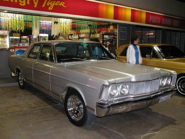 Ford Landau "série prata" 1977.